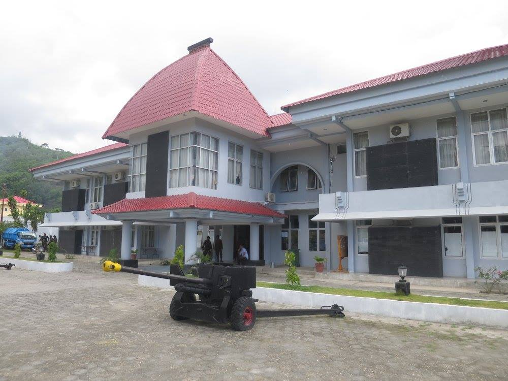 Sede do Municipio de Dili